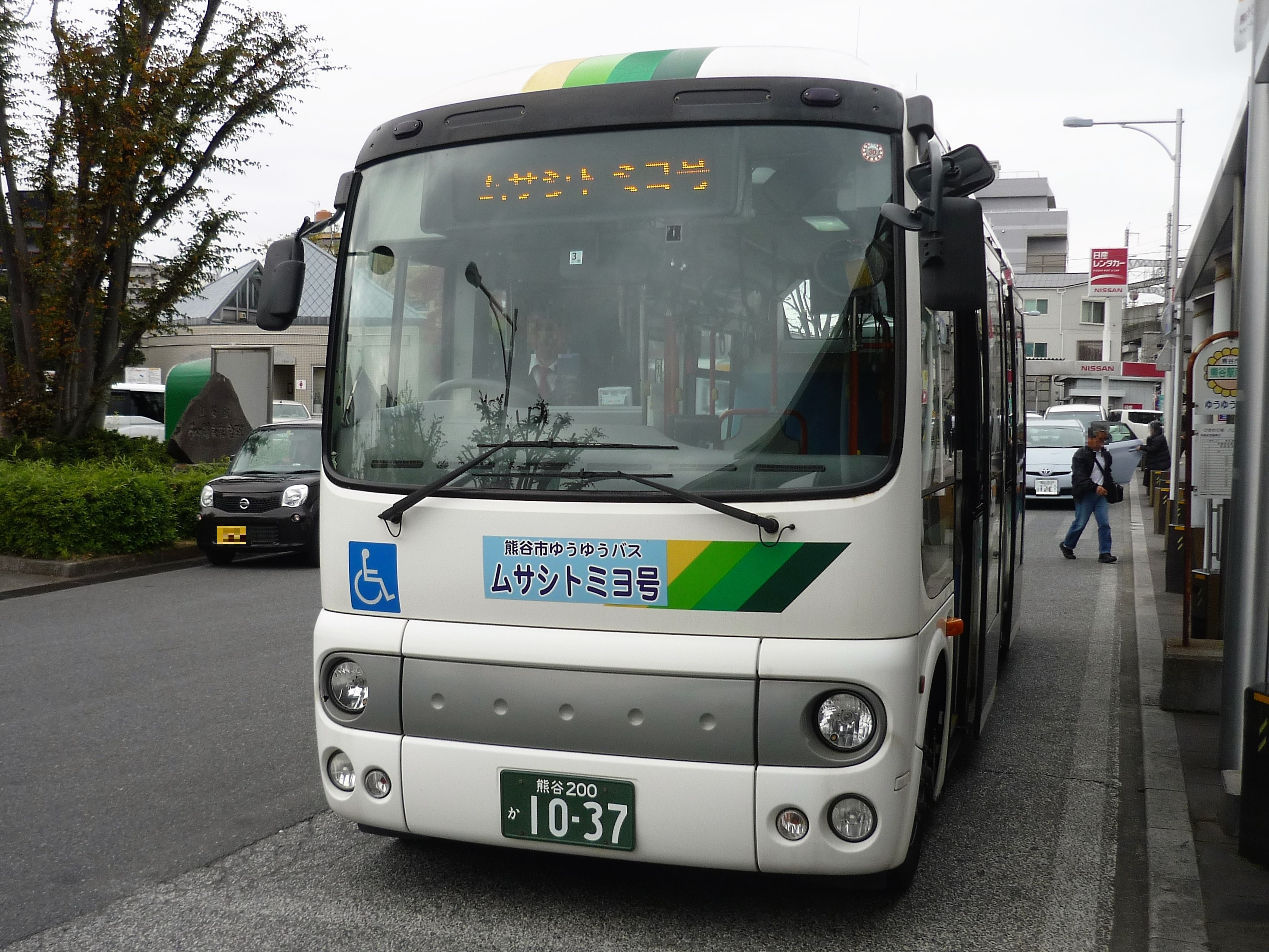 熊谷駅南口に停車する熊谷市ゆうゆうバス「ムサシトミヨ号」（協同バス運行） Panasonic Lumix DMC-FS3